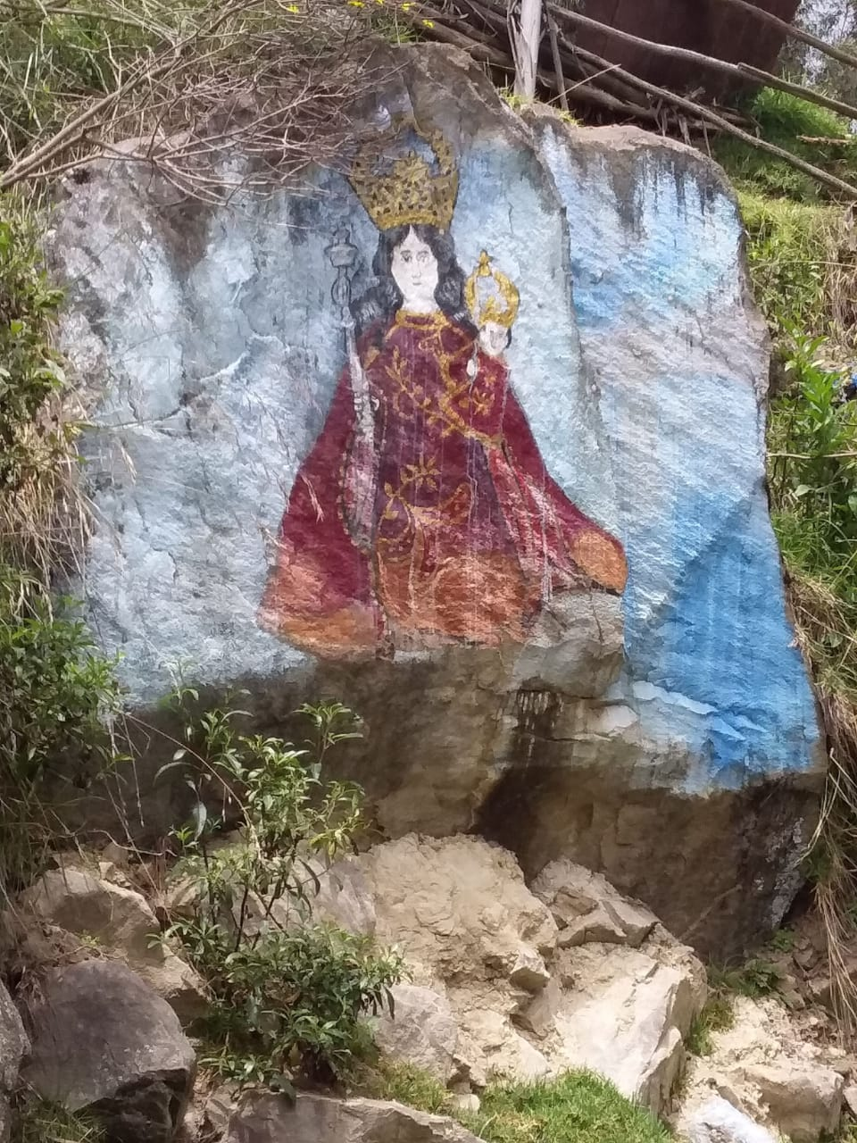 Virgen tallada en la piedra donde hizo su divina aparición.